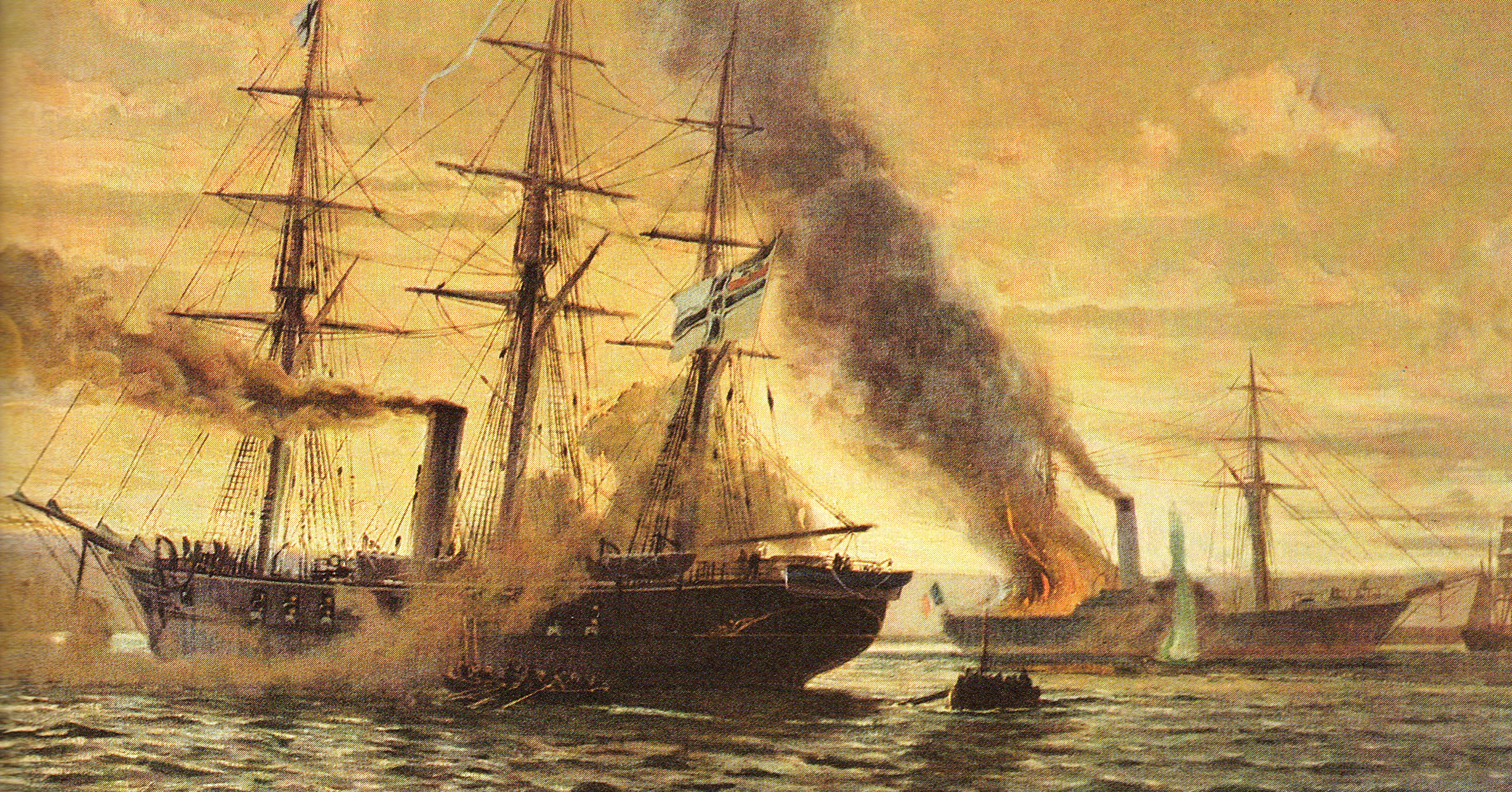 Attaque de navires marchands français par la corvette allemande Augusta dans la Gironde pendant la guerre franco-allemande de 1870-71.